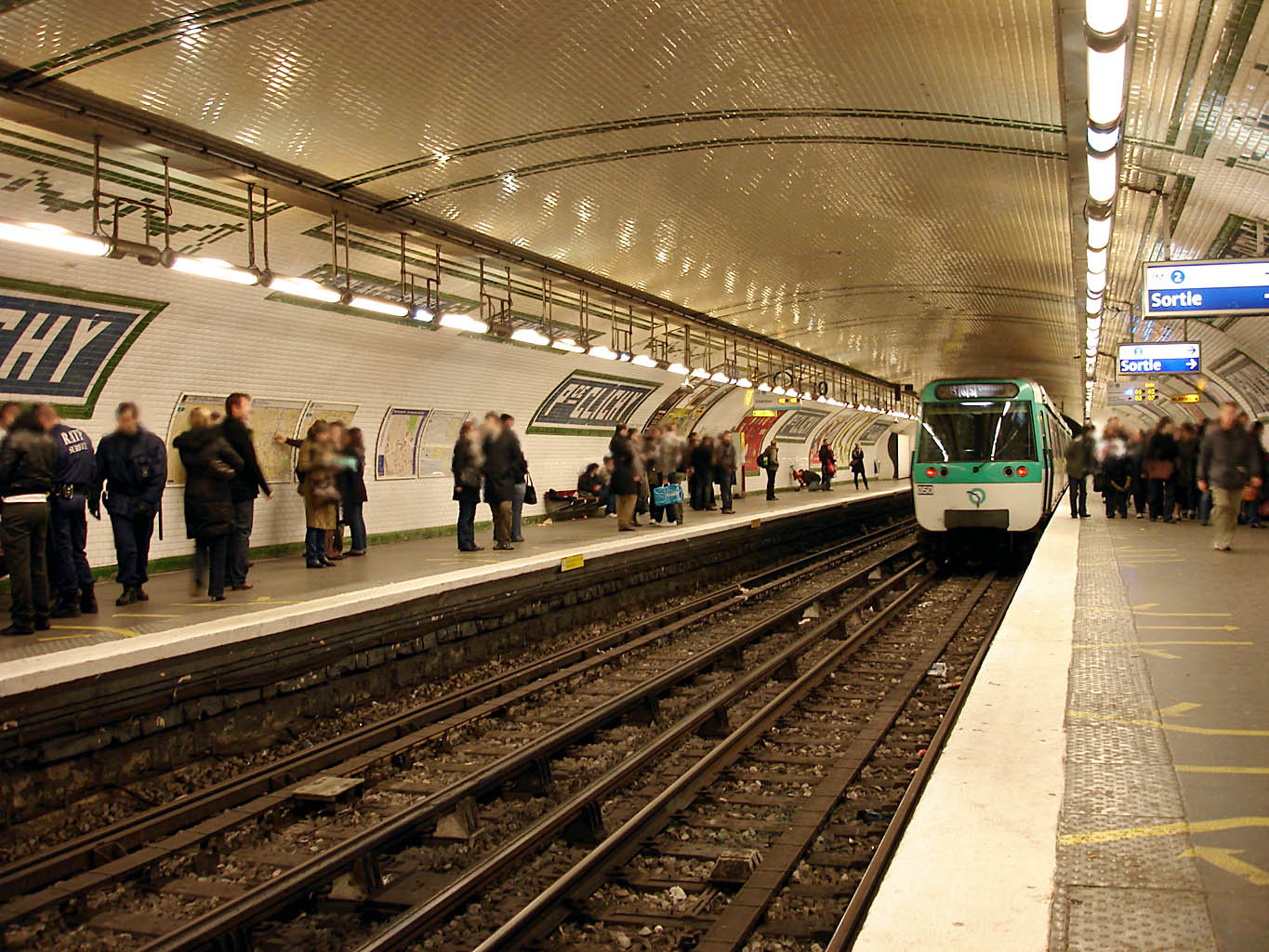 Station Place de Clichy de la ligne 13 du métro de Paris, France.